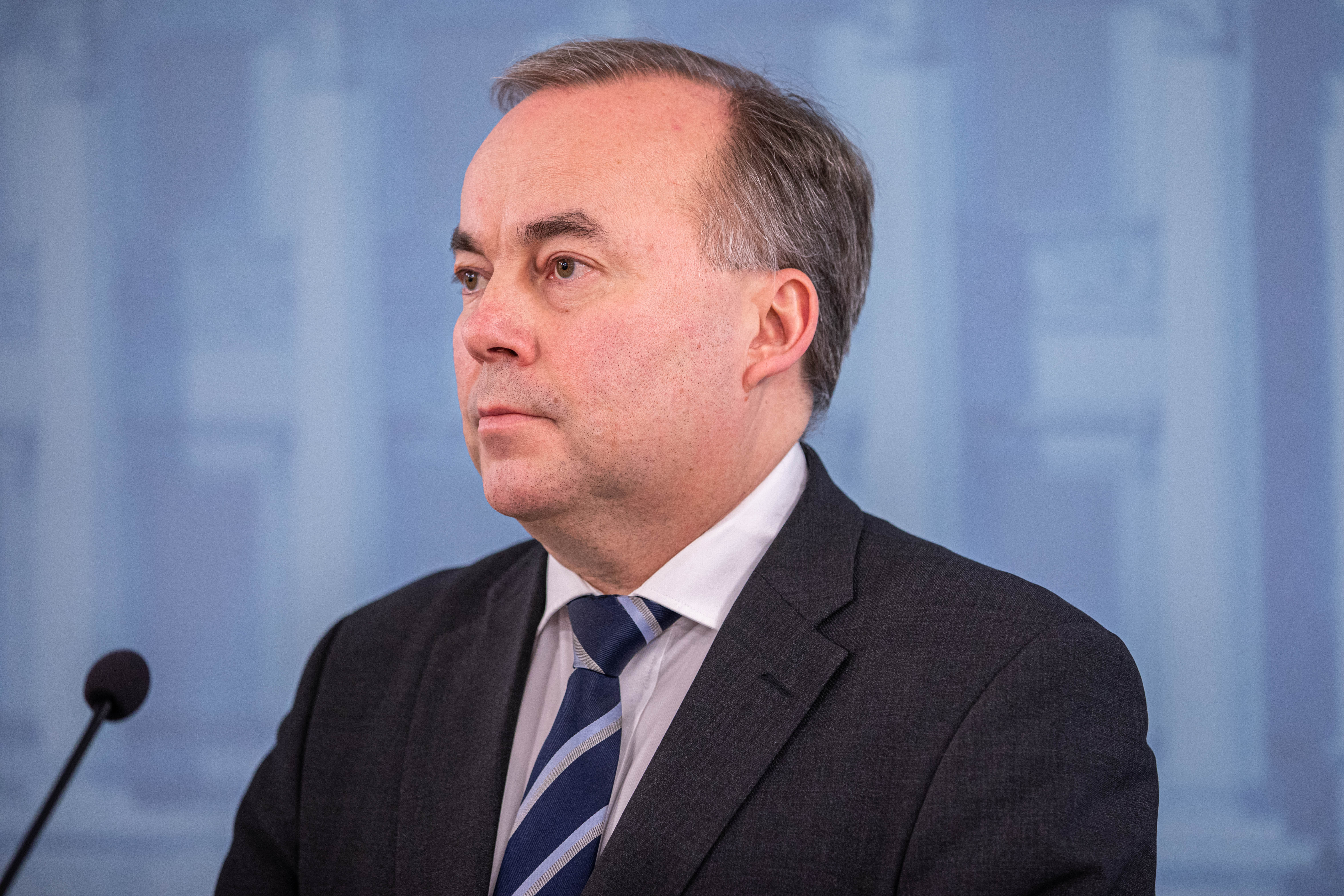 Suomen ulkoministeriön alivaltiosihteeri Pekka Puustinen tiedotustilaisuudessa. © Jussi Toivanen /valtioneuvoston kanslia